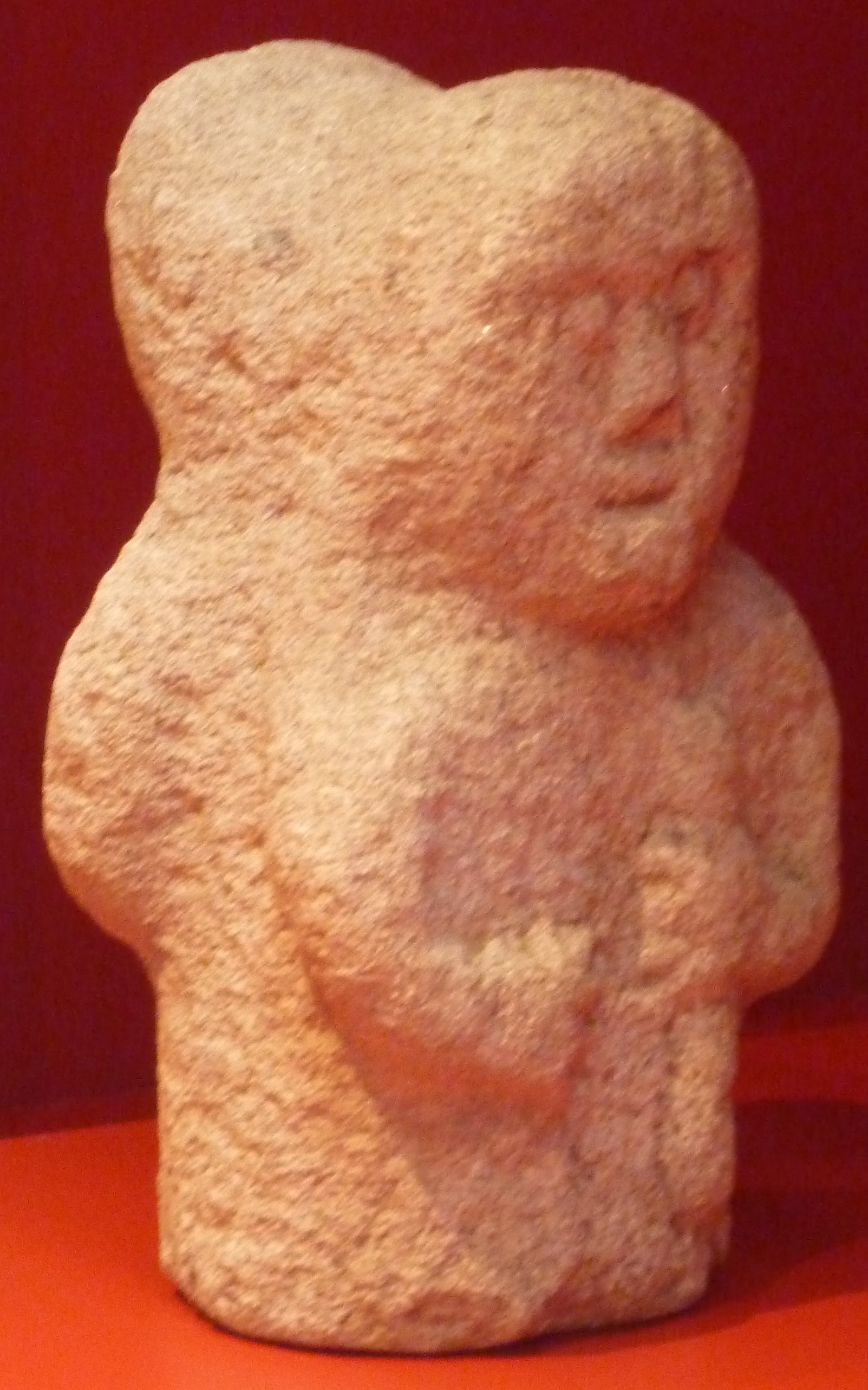 Laz : statuette sculptée sur les deux faces représentant Mercure, dieu de la fécondité (en granite, musée de Bretagne, Rennes)